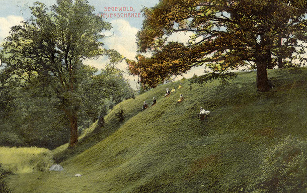 Sattesele linnamägi. Postkaart